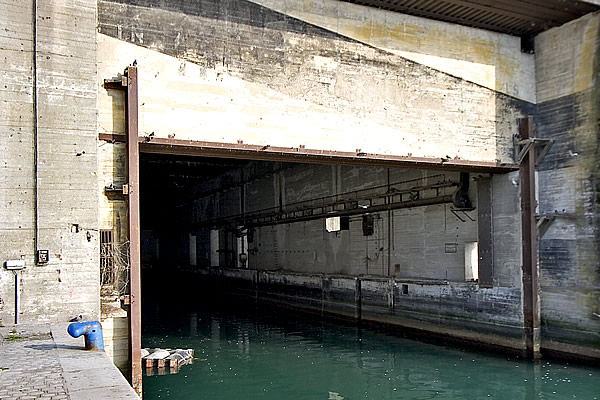 Base sous marine (WWII) du port de La Pallice. Entrée d'une alvéole. Pep.per de Ré Photo issue de ma banque d'images